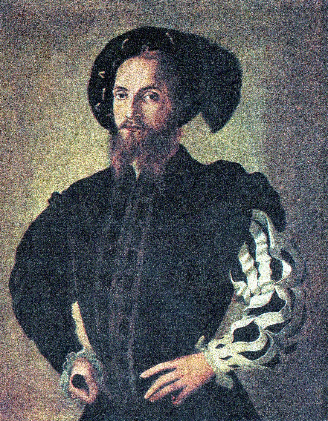 ritratto probabile di Cesare Borgia, attribuito da alcuni critici a Sebastiano del Piombo - Collezione Rotschild, Parigi